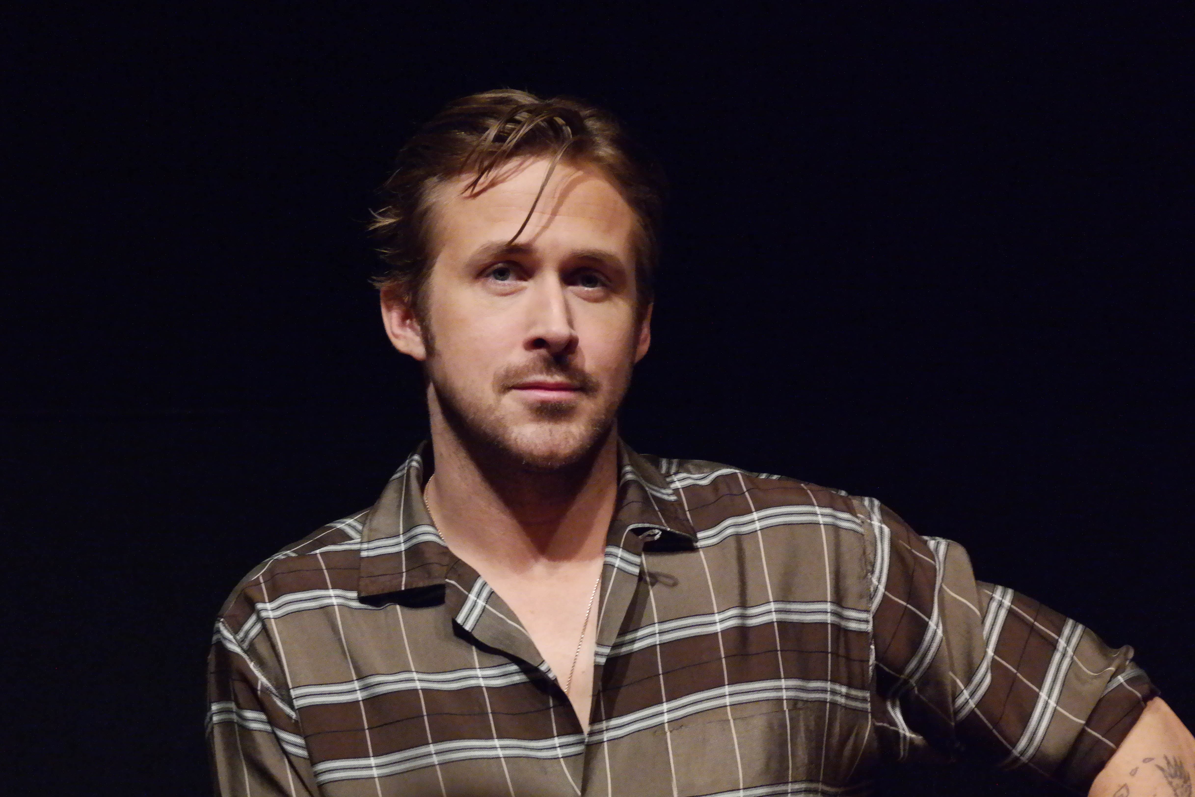 Rencontre avec Ryan Gosling et Reda Kateb pour Lost River